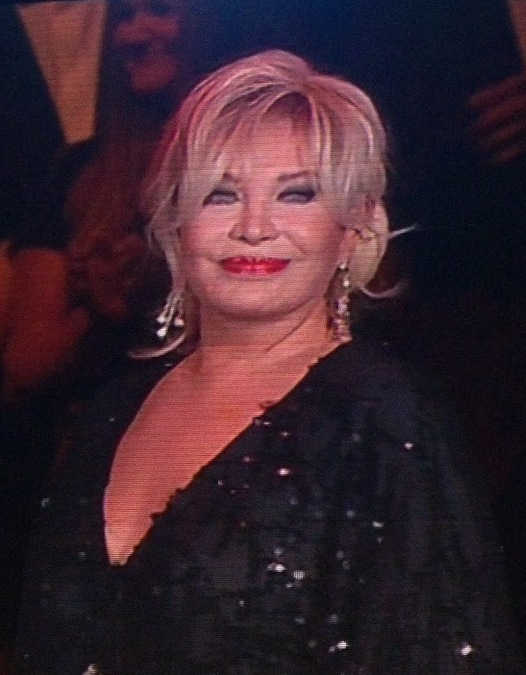 Emel Sayın'ın 8 Eylül 2014 tarihli Kuruçeşme Arena konserinden görünüm.